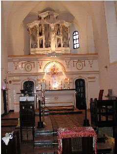 Innenansicht der renovierten Kirche in Jakobsdorf. Bild mit Genehmigung des Inhabers, der Kirchengemeinde Jakobsdorf.